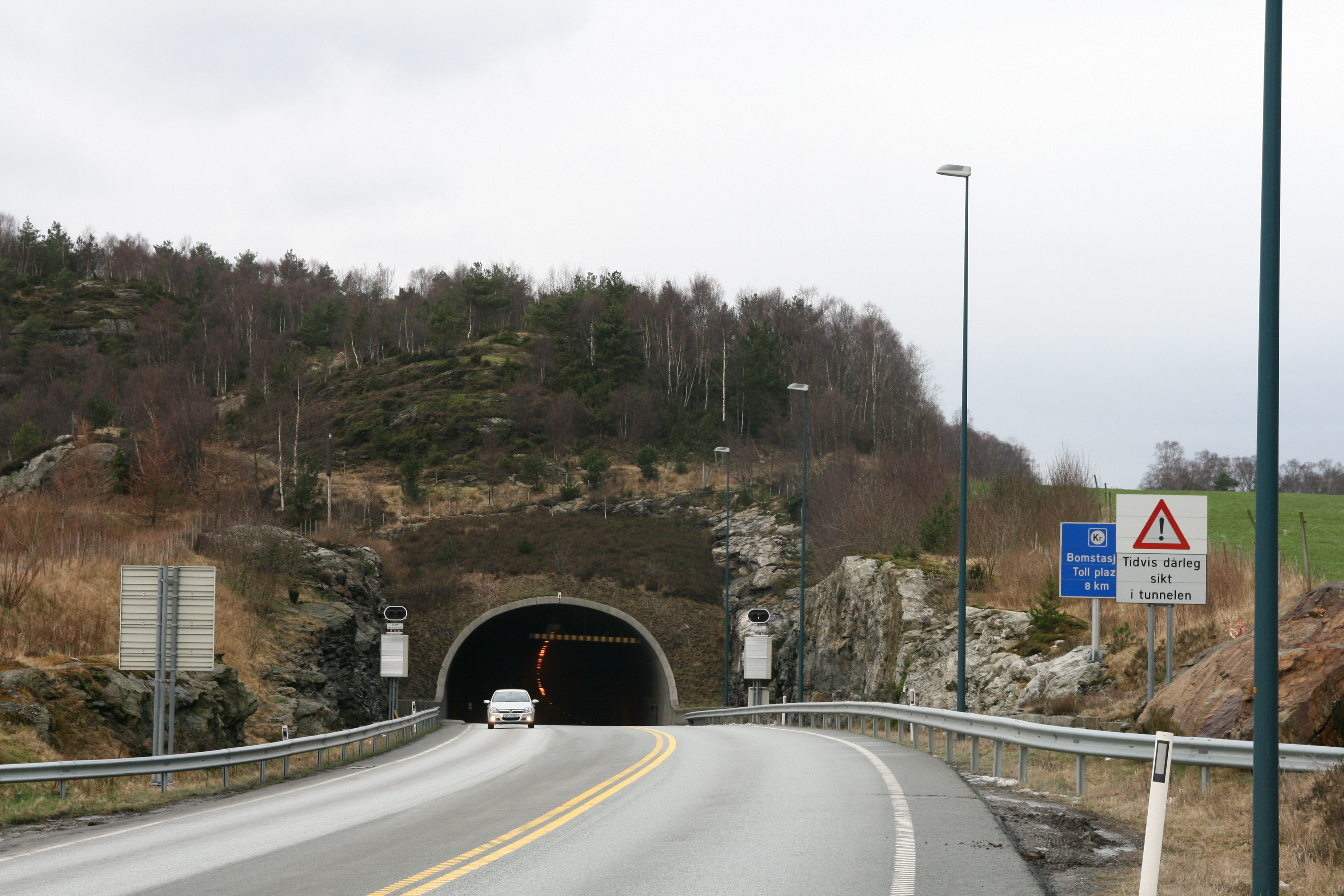 Bømlafjordtunnelen